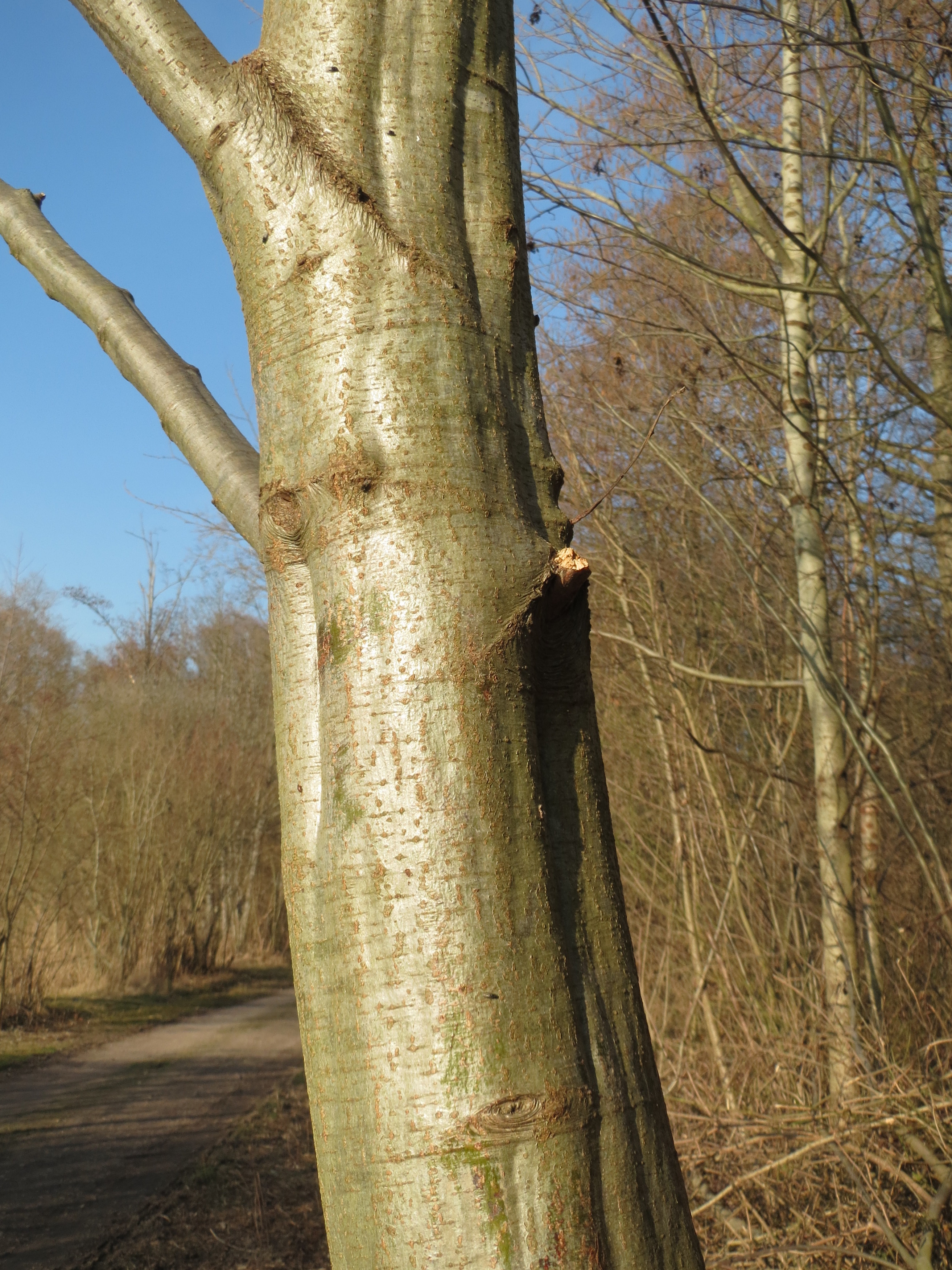 Grau-Erle (Alnus incana) bei Oberhausen-Rheinhausen